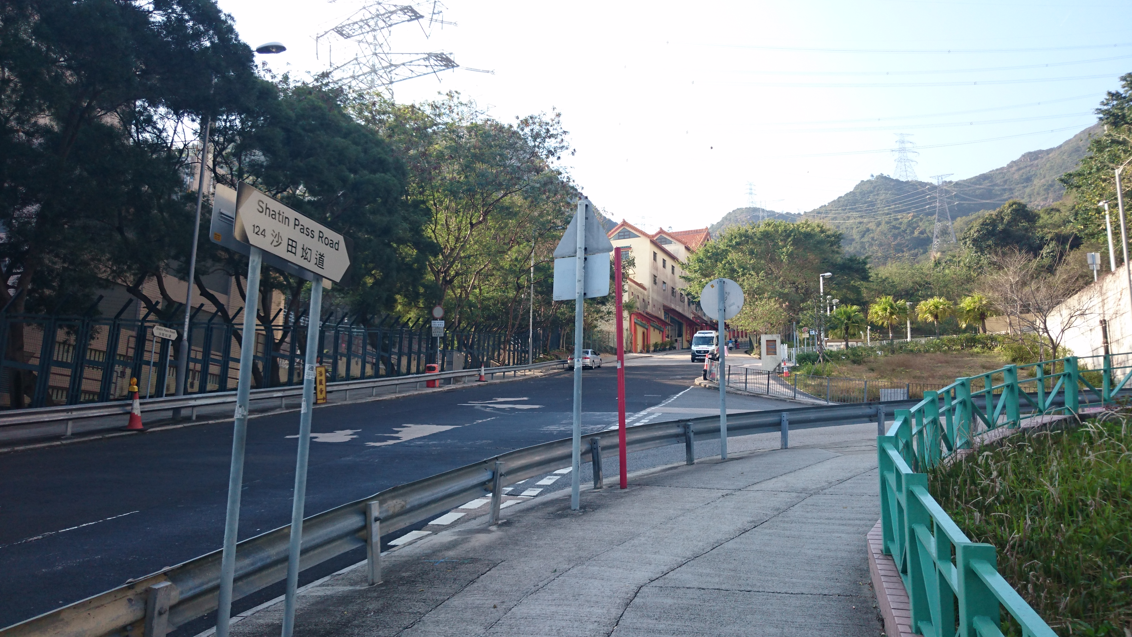 Sha Tin Pass, Hong Kong